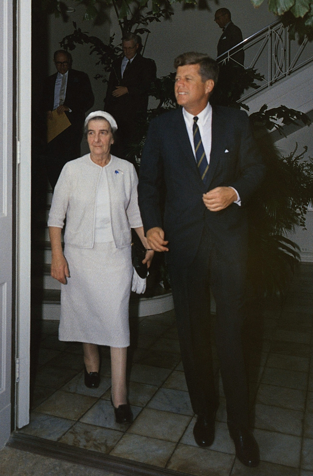 ראה"מ גולדה מאיר עם הנשיא קנדי בעת ביקורה בארצות הברית